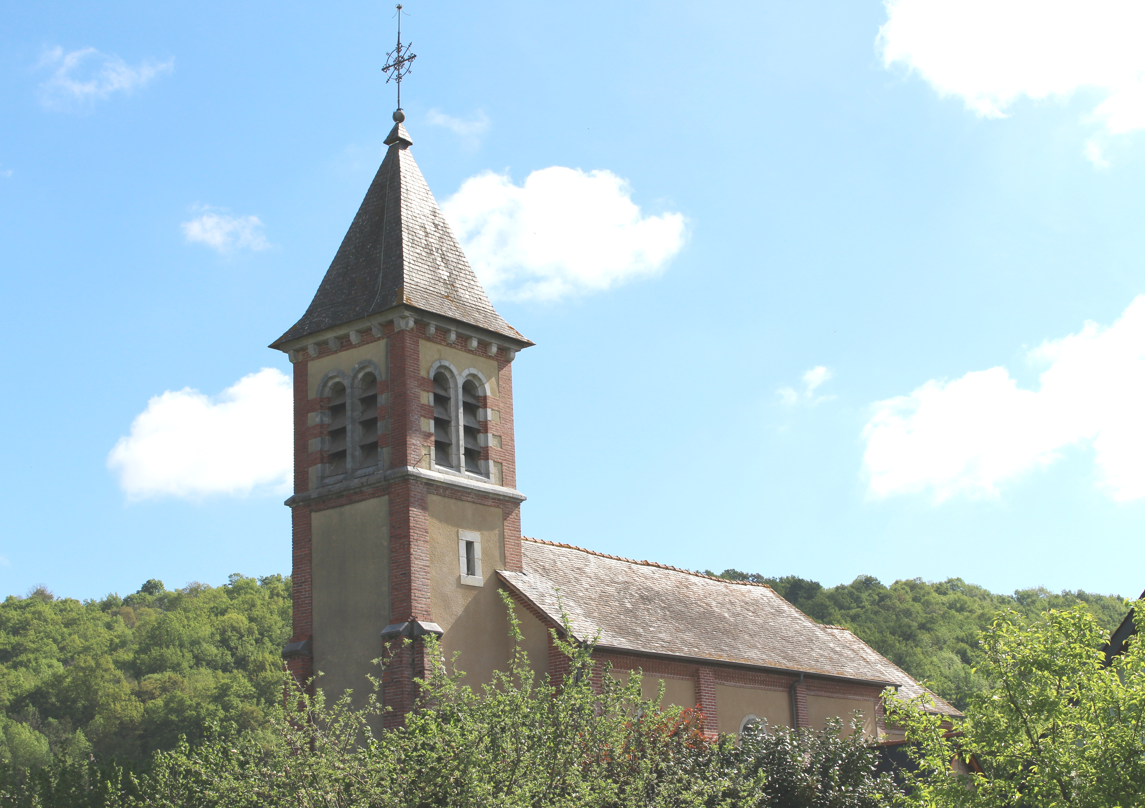 Église Saint-Étienne de Hibarette (Hautes-Pyrénées)